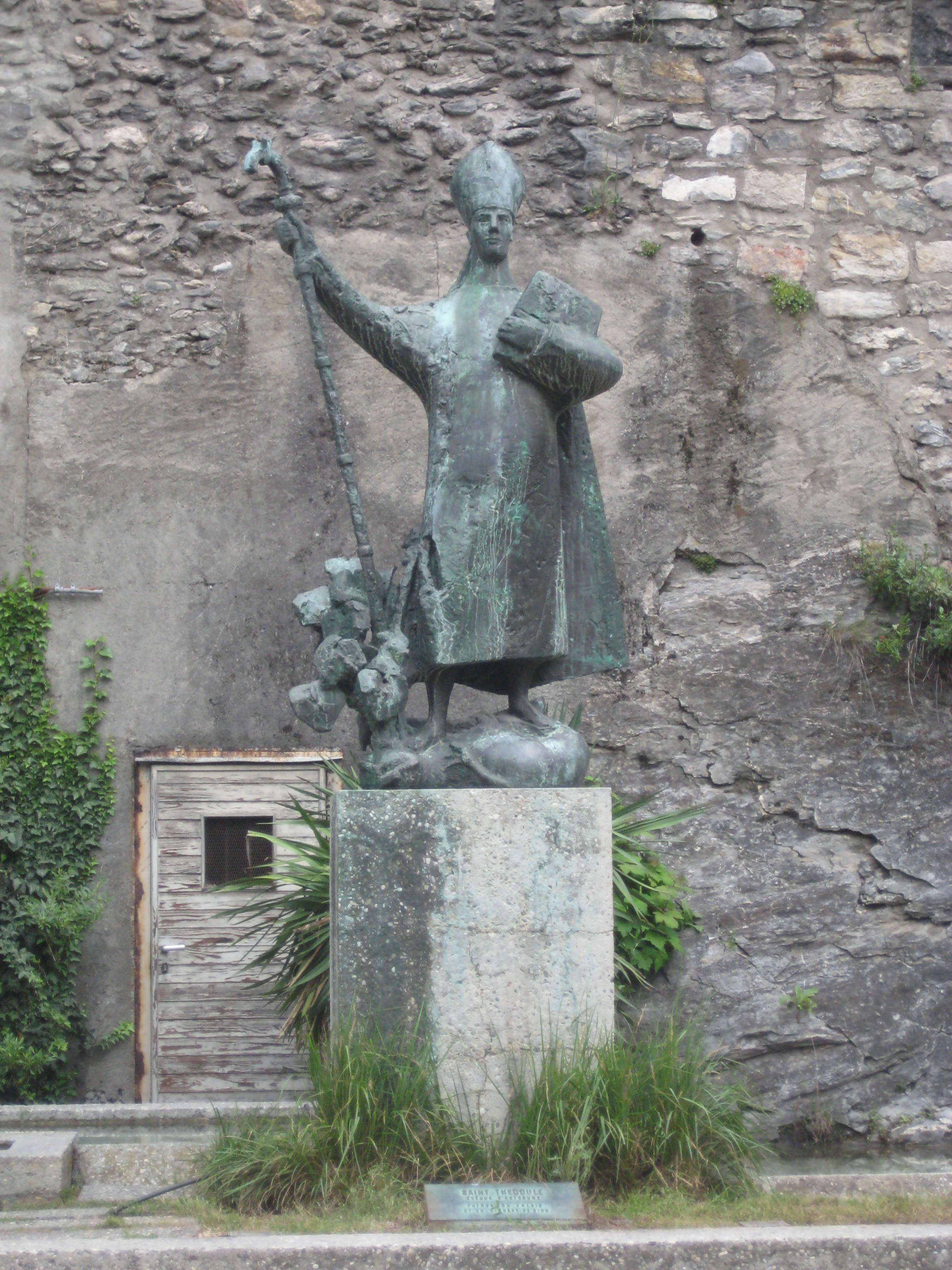 statue de Saint Théodule, Sion, Valais, Suisse